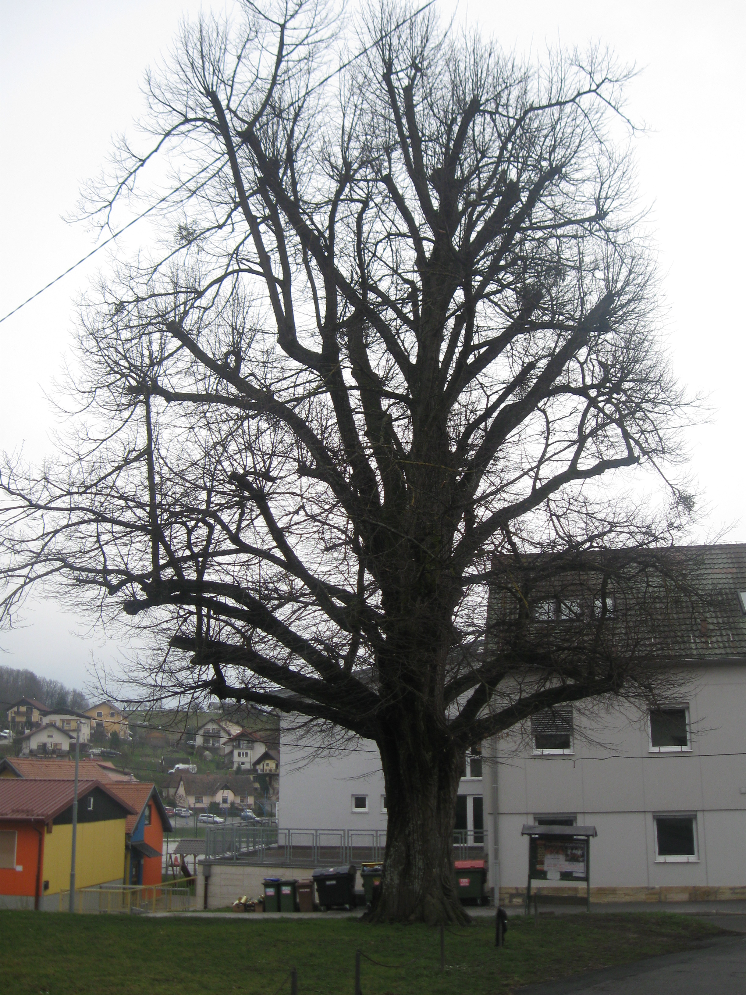 Mogočna lipa v Benediktu v Slovenskih goricah.